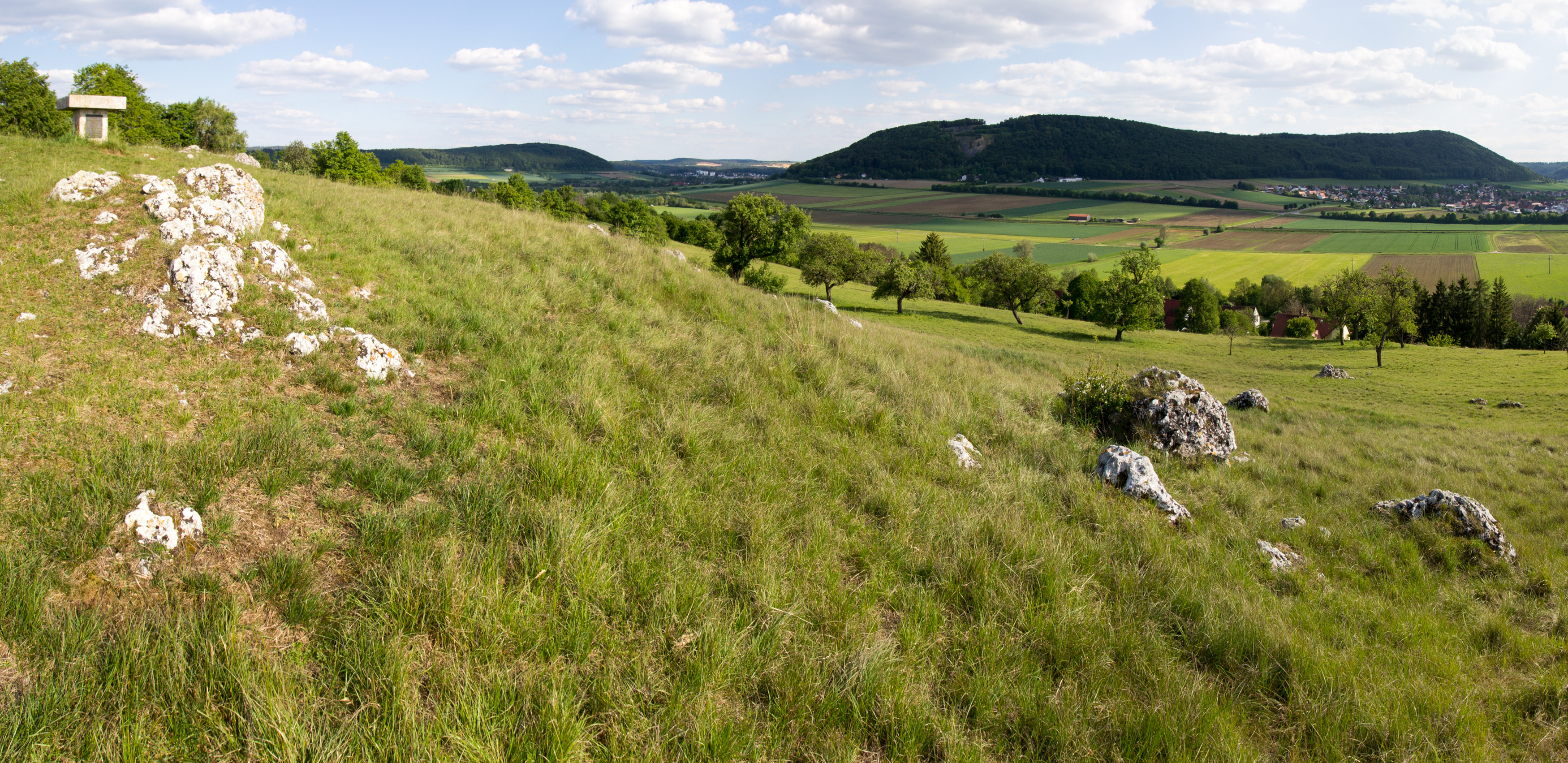 Auswurfmaterial (Härtlinge) im Vordergrund auf der Bergkuppe des Bubenheimer Berges, mit Blick auf die Franken Alb